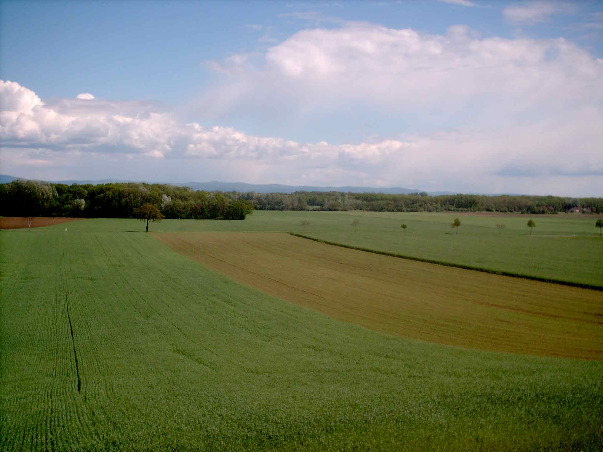 Schlacht auf dem Marchfeld: Bild des heutigen Schlachtfelds, welches aufgrund seiner Ebene gewählt wurde um den berittenen Einheiten (auf beiden Seiten) einen Vorteil zu verschaffen.